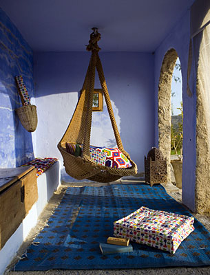 Alojamiento RAAR